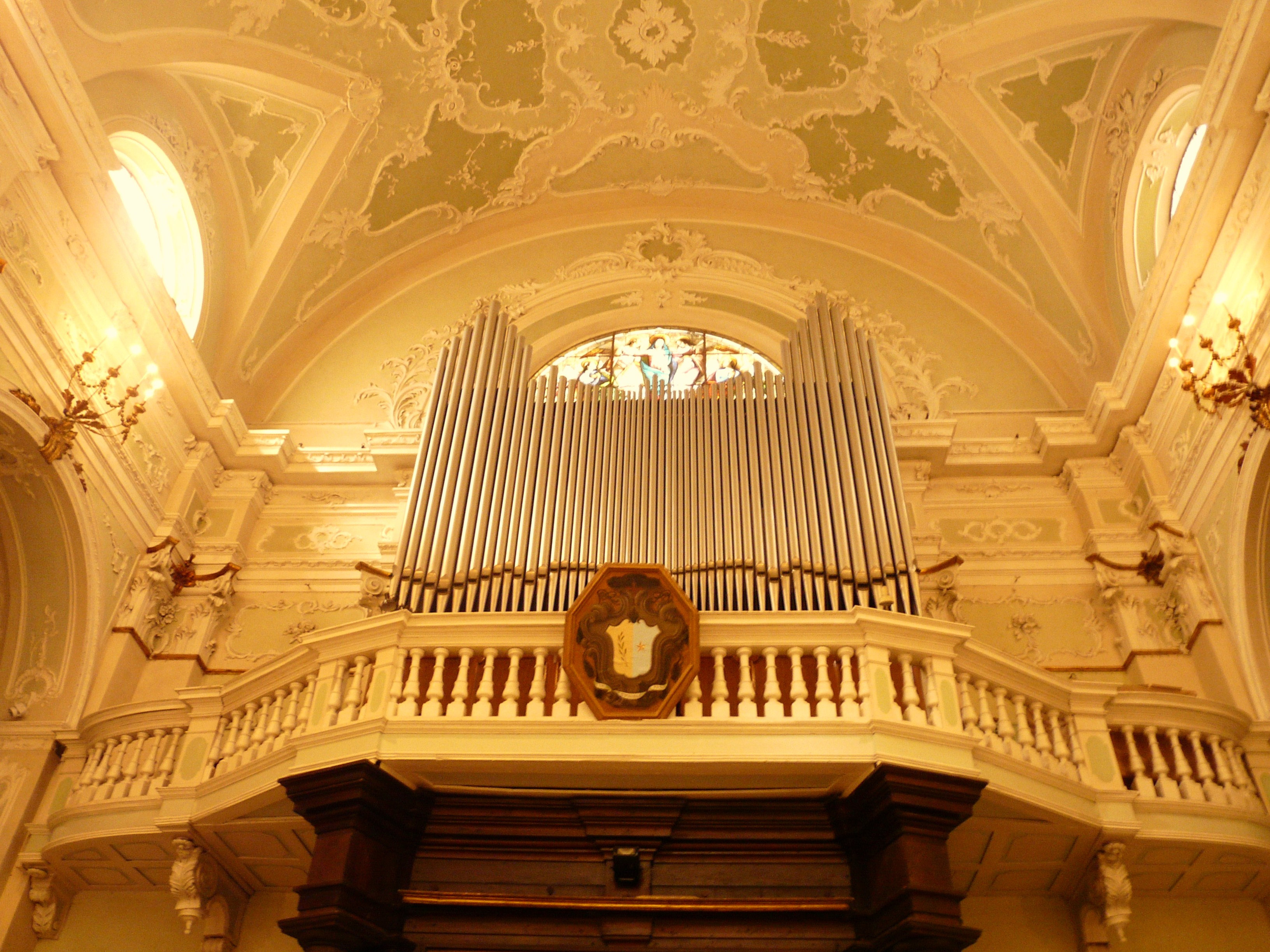 Interni della Cattedrale di Santa Maria del Popolo, Pontremoli, Toscana, Italia